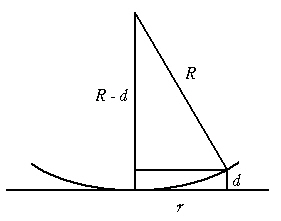 牛顿环定量分析所需数据图